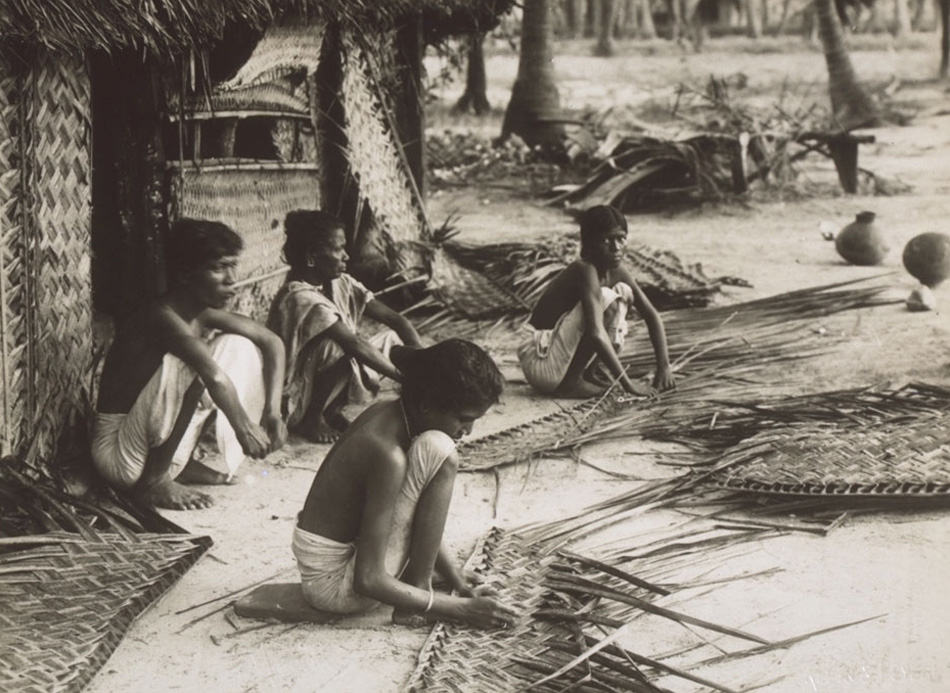 ഓല മെടയുന്ന സ്ത്രീകള്‍ .